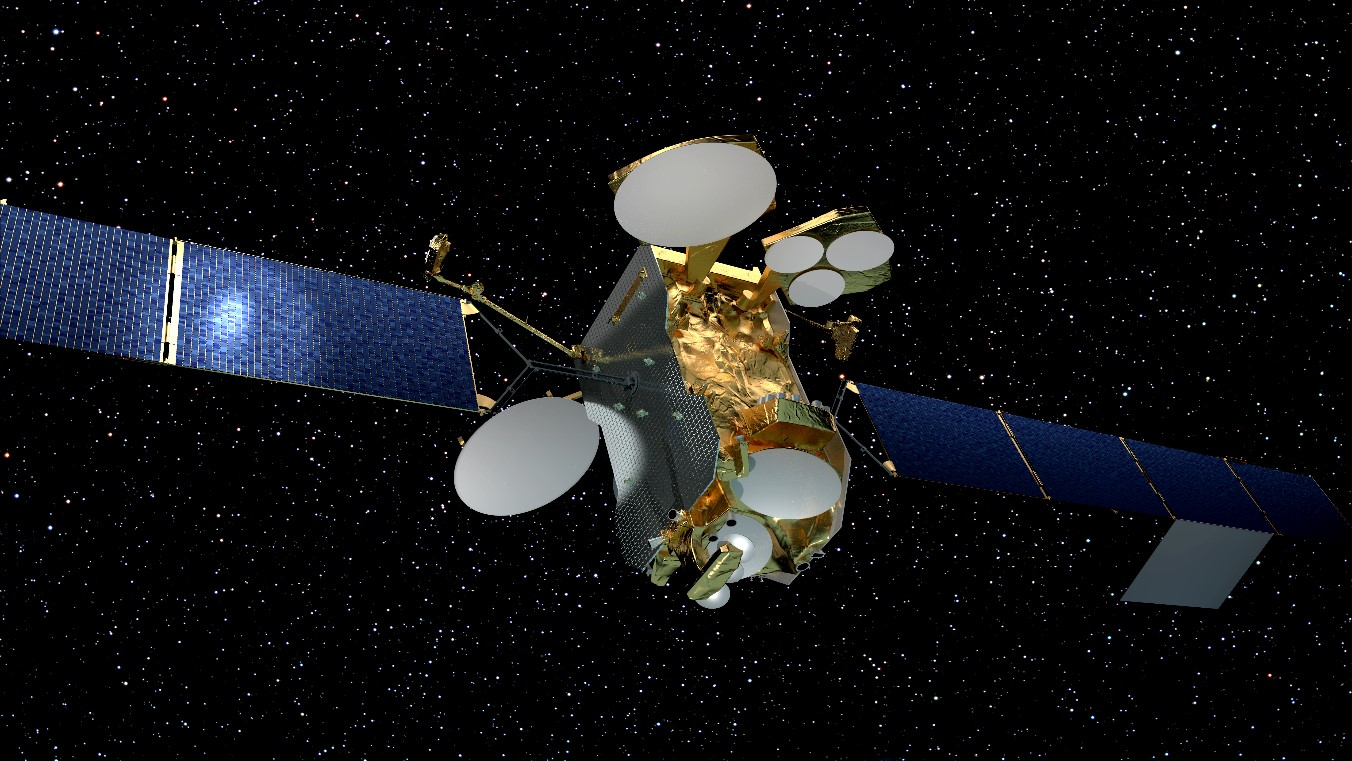 elteusat 172b